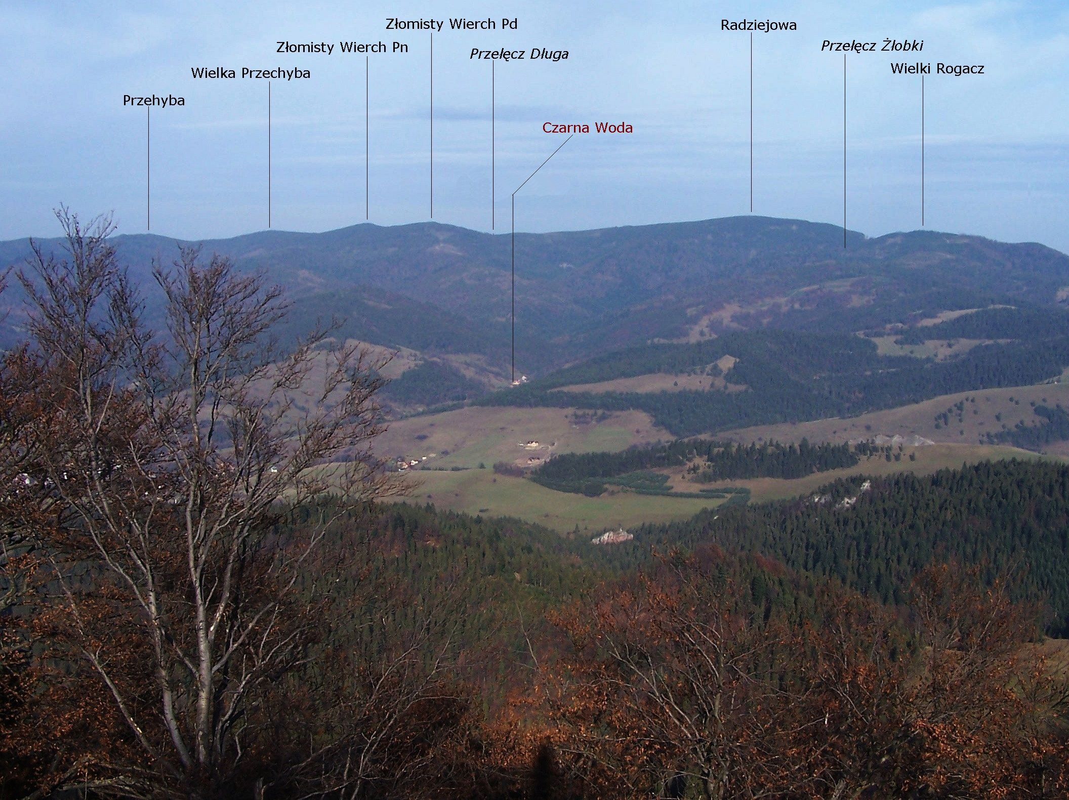 Widok z Wysokiej w Pieninach